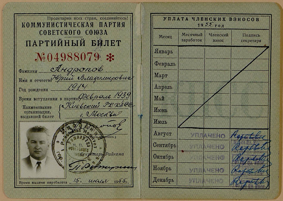 Андропов Юрий Владимирович, партийный билет